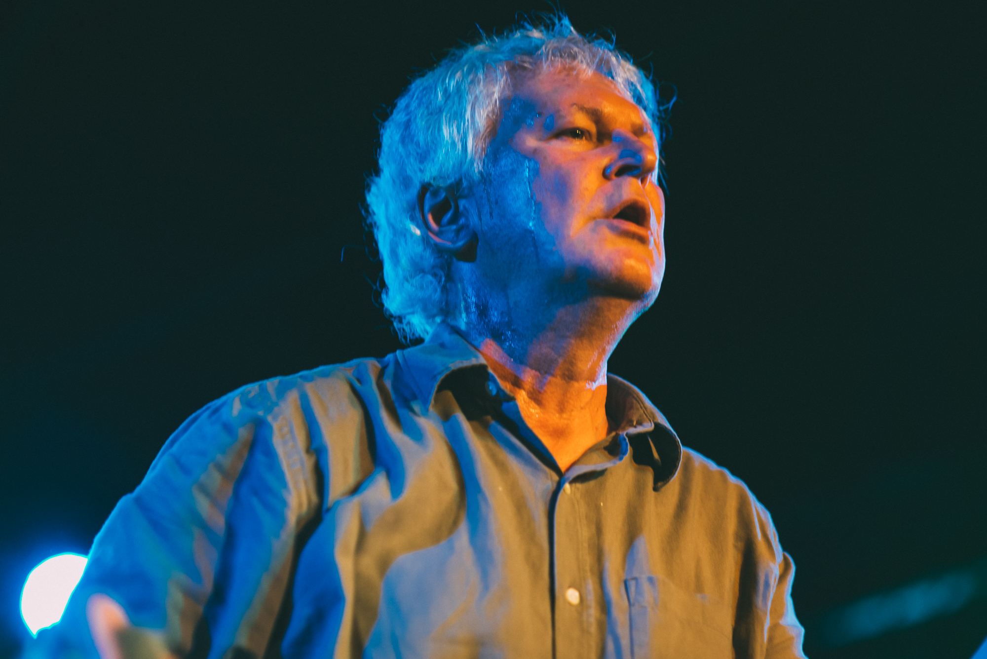 Guided by Voices tijdens een optreden in de Belly Up Tavern in San Diego (Californië)